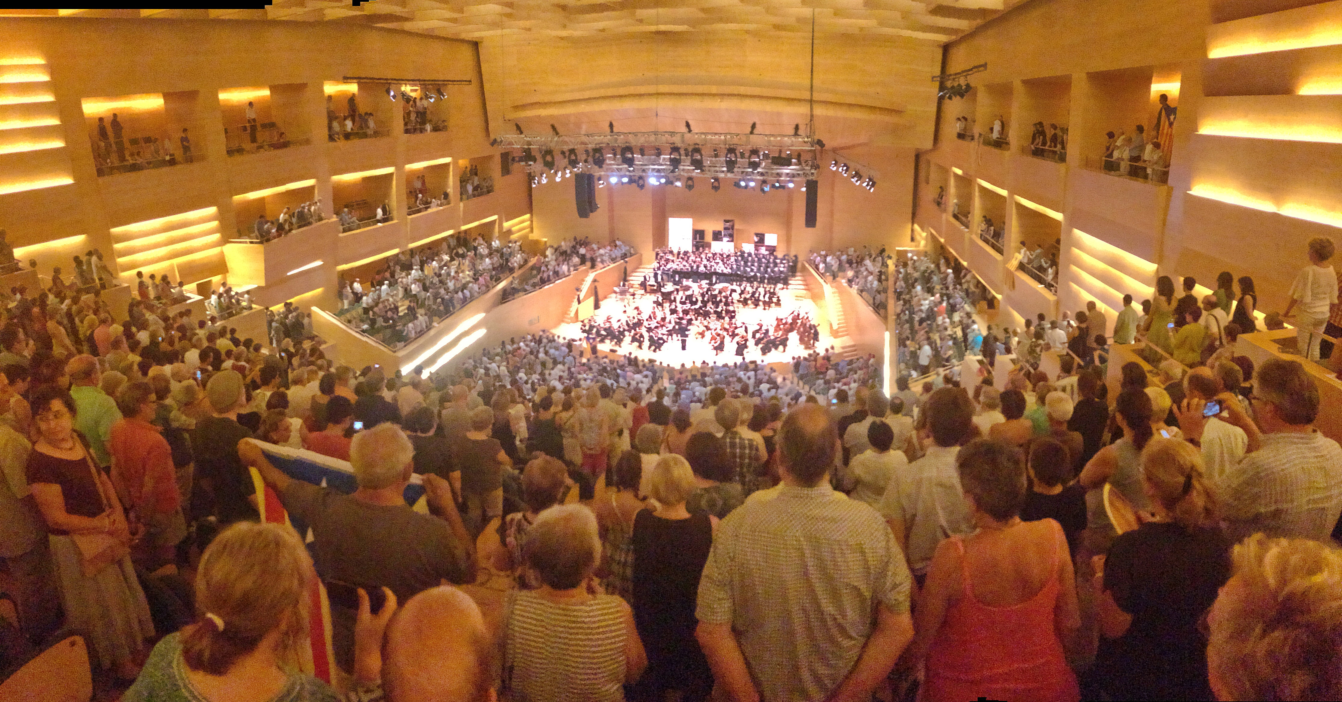 Estrena en versió simfònico-coral de la suite "Catalunya 1714" de Salvador Brotons, amb el públic cantant "Els Segadors" junt amb l'Orquestra Simfònica de Barcelona i Nacional de Catalunya, amb acompanyament de la Coral Càrmina, el Cor de Cambra de Granollers i el Cor Amics de la Unió. 19 de juliol de 2014 a la sala gran de l'Auditori de Barcelona